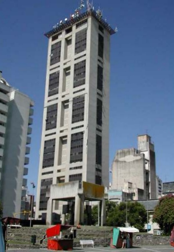 Torre Angela, Córdoba (Argentina)